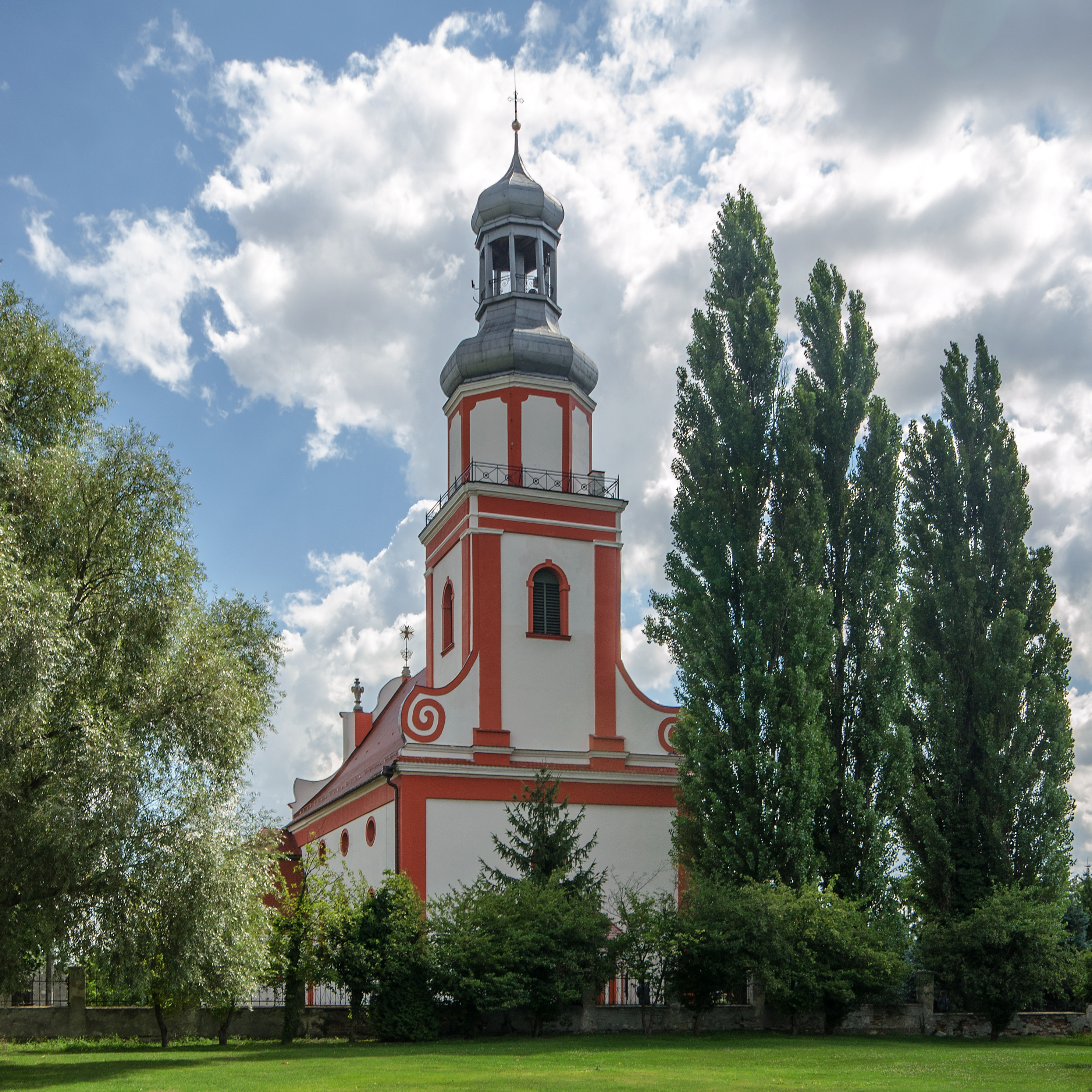 Łosiów, kościół par. p.w. św. Jana Chrzciciela, 1 poł. XVIII